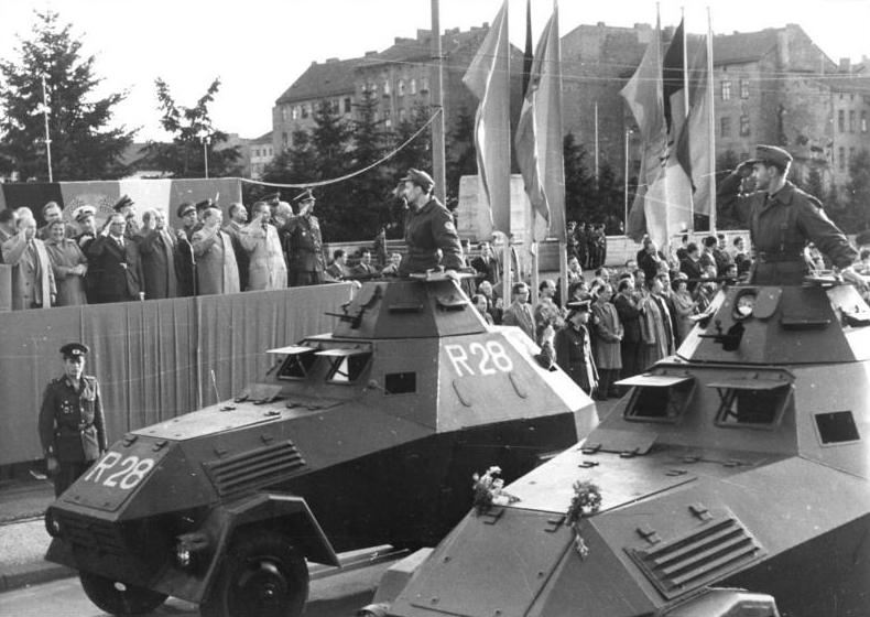 Zentralbild-23.8.1961-Feierlicher Appell der Berliner Kampfgruppen. Die Bürger der Hauptstadt und mit ihnen führende Vertreter der Partei der Arbeiterklasse statteten am 23.8.1961 auf einem Appell der Berliner Kampfgruppen den Angehörigen der Arbeiterbataillone den Dank von Millionen Bürgern der DDR für ihre Einsatzbereitschaft ab. Die Kämpfer in den steingrauen Uniformen waren im Herzen der Hauptstadt, auf der Großbaustelle zwischen dem Strausberger Platz und dem Alex, unter den roten Fahnen der Arbeiterklasse aufmarschiert. UBz: Panzerspähwagen während der Parade.